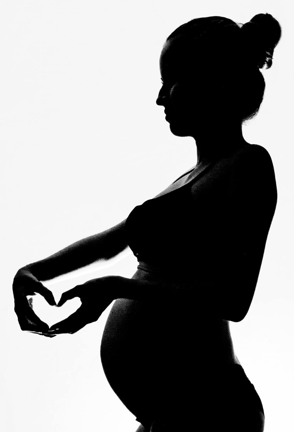 La2 fotografia embarazada